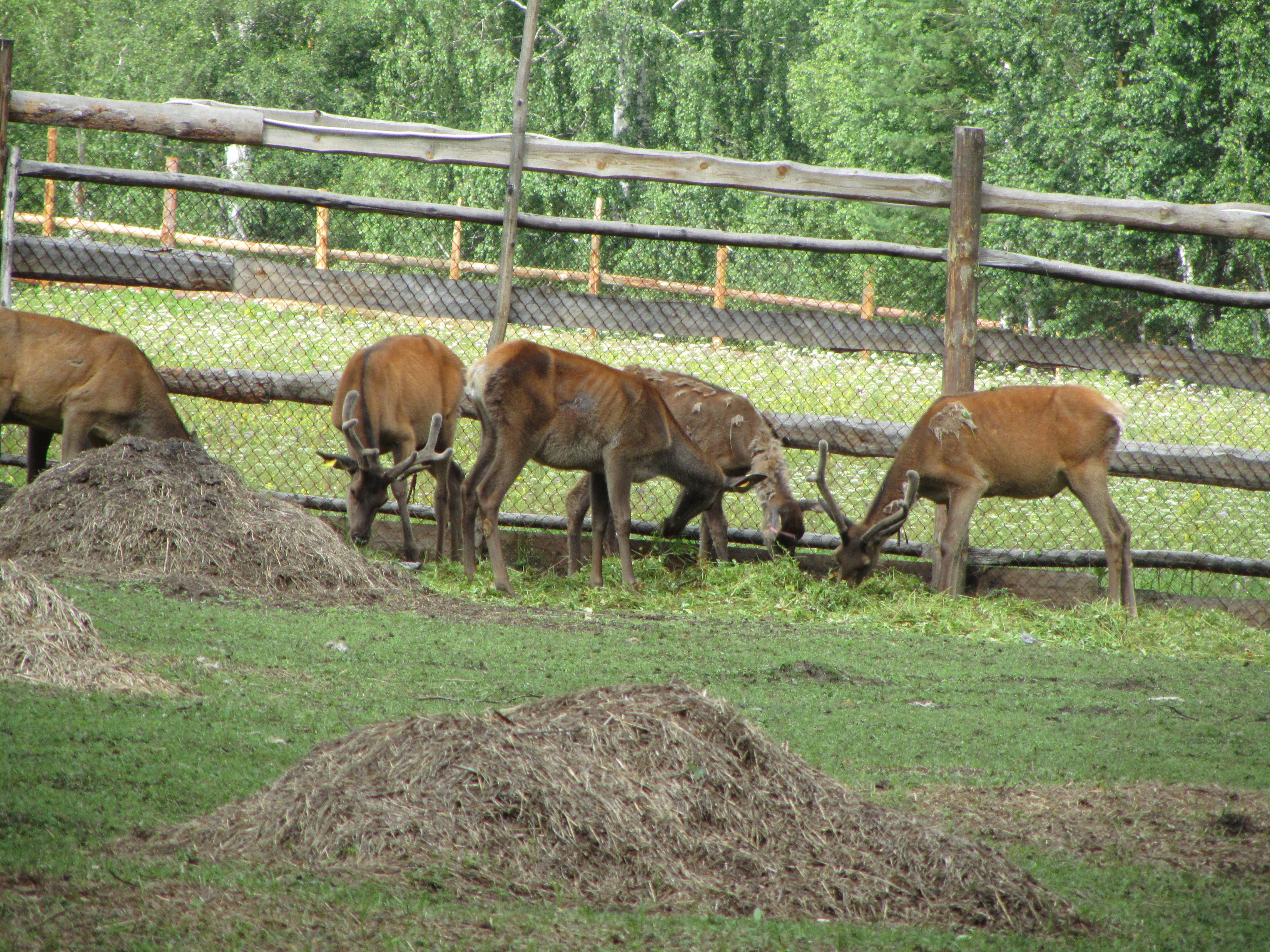 Маралы в Башкирском государственном природном заповеднике Башҡортса: Башҡорт дәүләт заповеднигында боландар